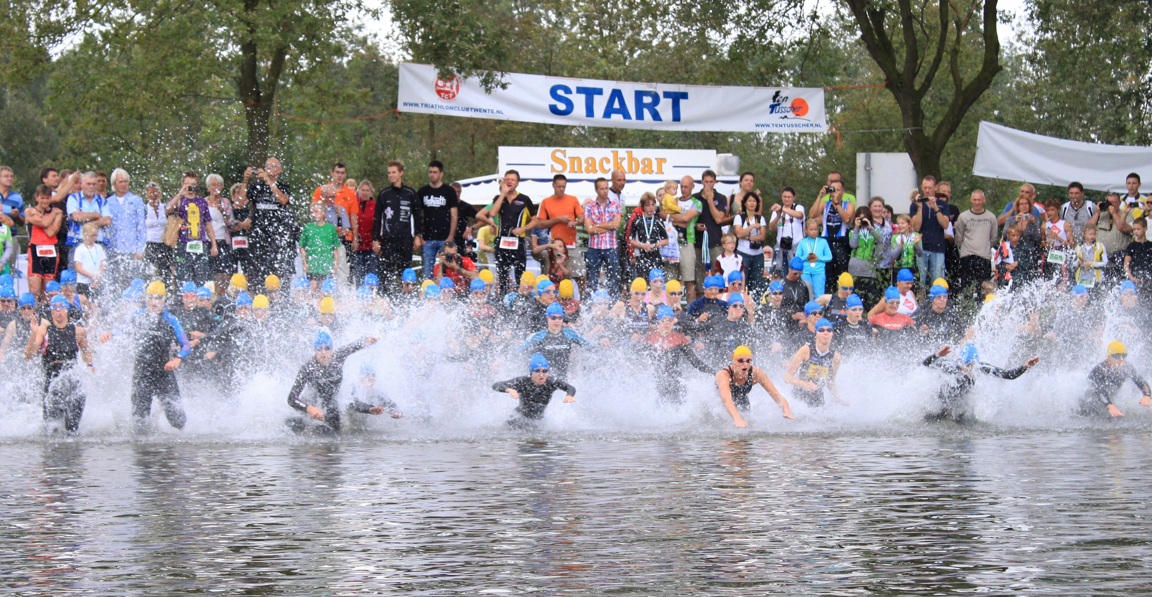 Jaarlijkse Rutbeek Triathlon